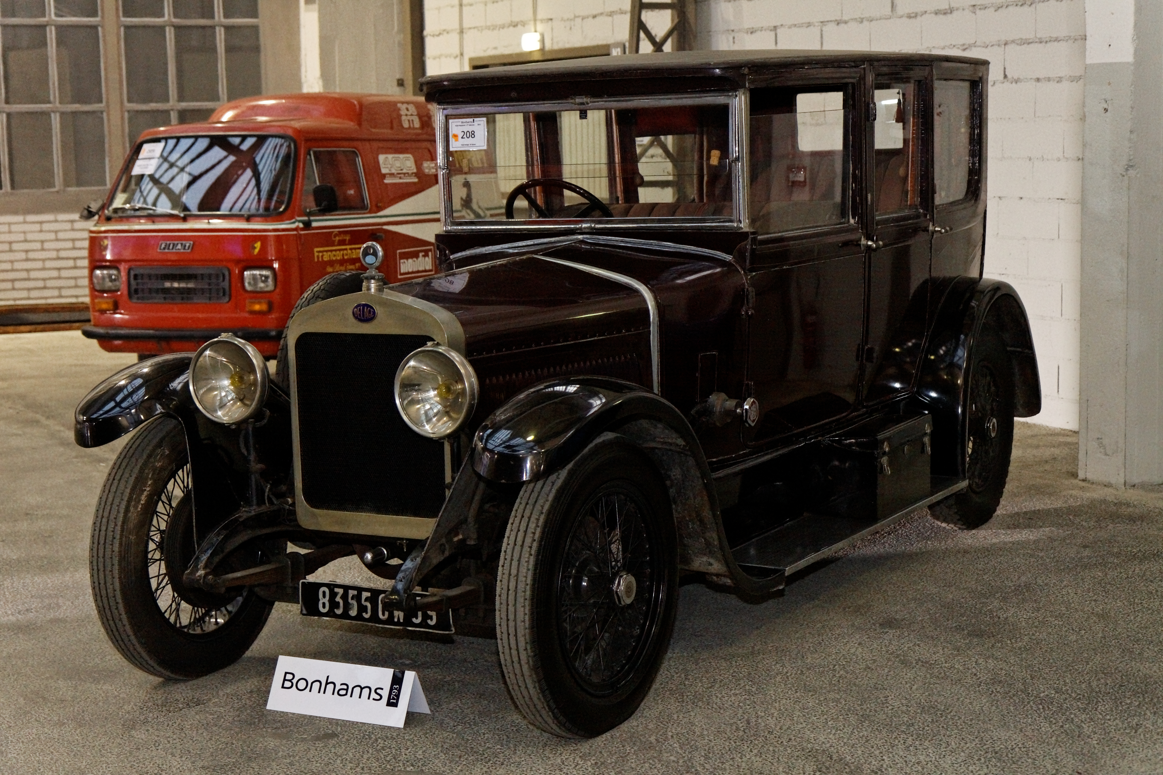 Delage DI Saloon